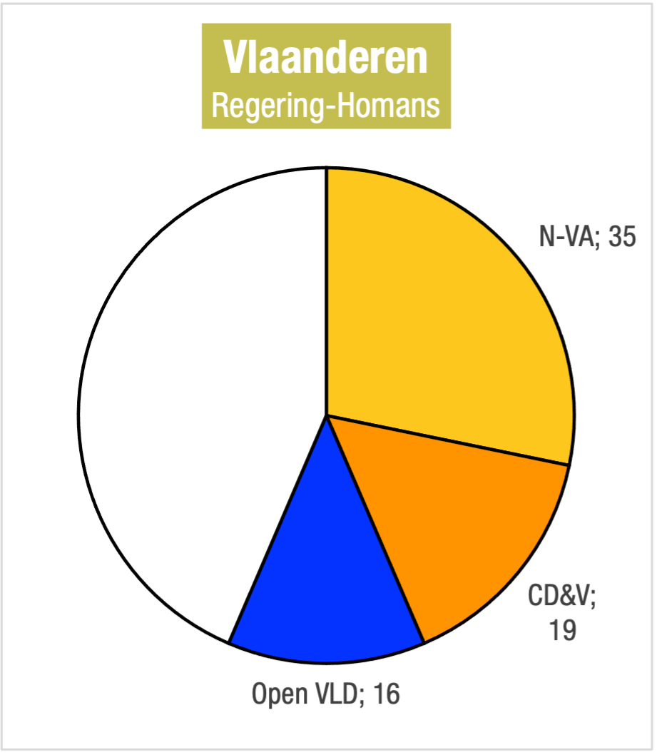 Regeringsmeerderheid regering-Homans in het Vlaams Parlement op basis van de verkiezingsresultaten van 26 mei 2019